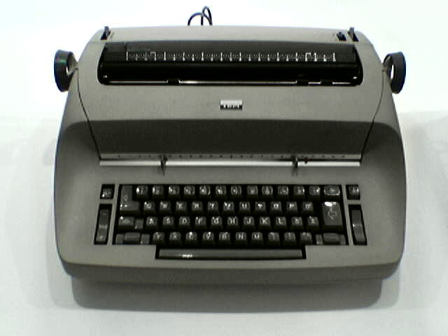 Elektrische Schreibmaschine IBM Selectric, 1961, Pinakothek der Moderne, München IBM Corporation, Endicott, New York, USA Eliot Noyes 1910-1977